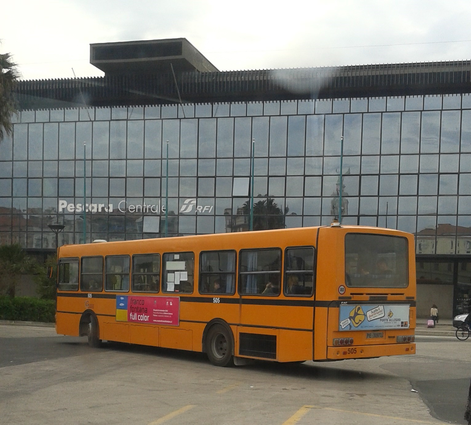 Uno dei mezzi più anziani del parco: il Menarini 201/2SLS matricola 505, adibito oggi ai servizi scolastici della linea Pescara-Penne